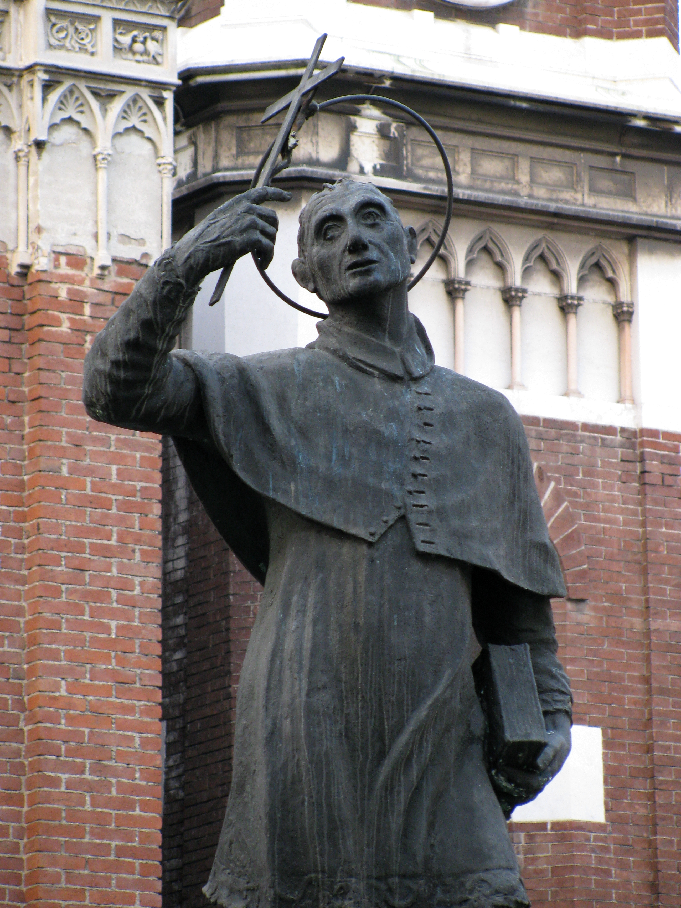 Statua di San Carlo Borromeo sita in via Zucchi (Monza - MI)